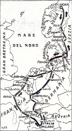 A cura di Federica Frattini